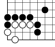 詰棋問題2